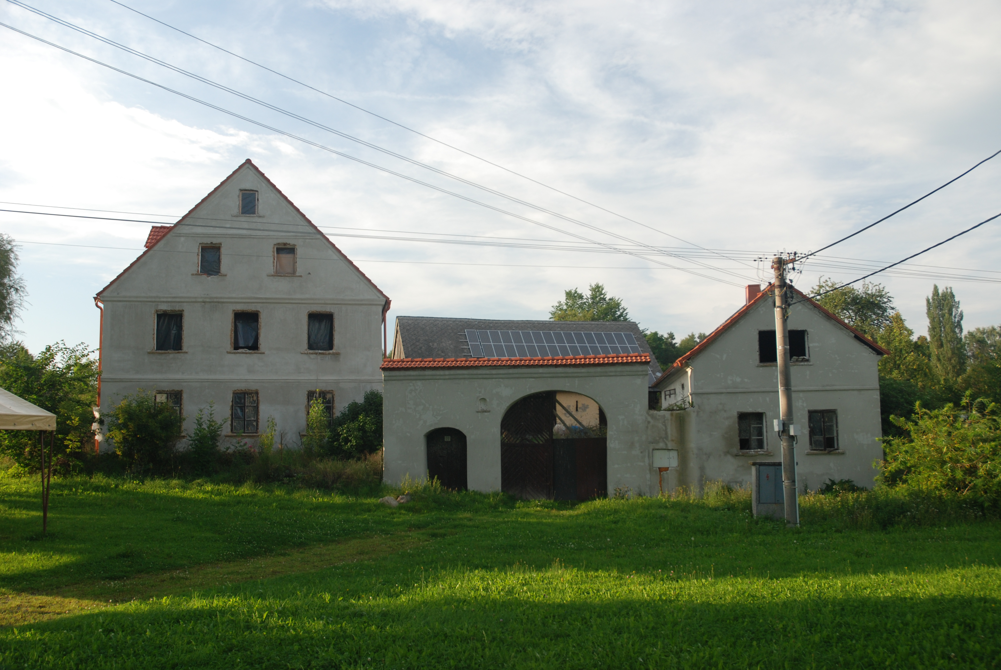 Náves